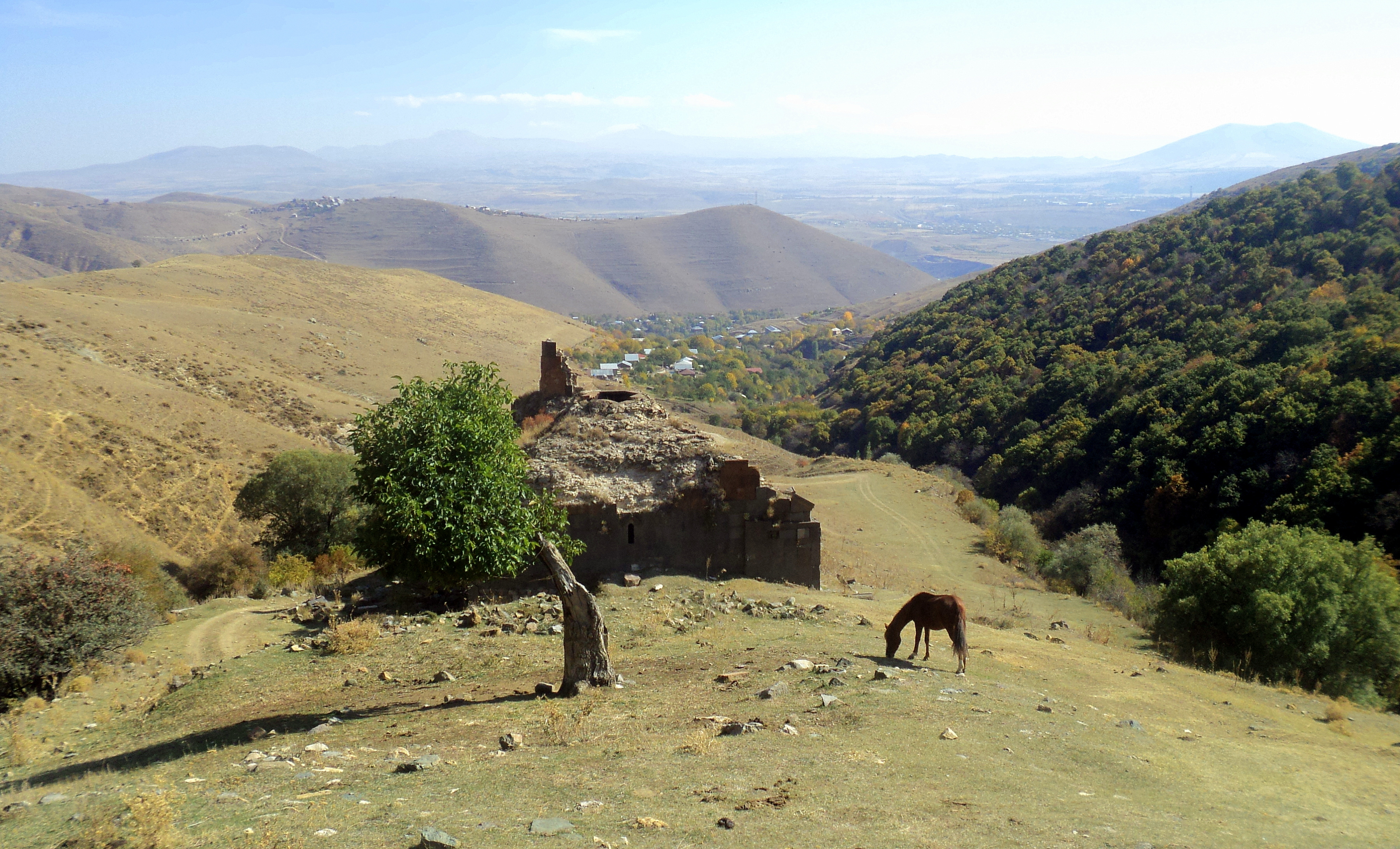 Վանական համալիր Նեղուցի վանք (Արզականի վանք, Սբ. Աստվածածին, Նեղոց Սբ. Աստվածածին), Արզական 15/18